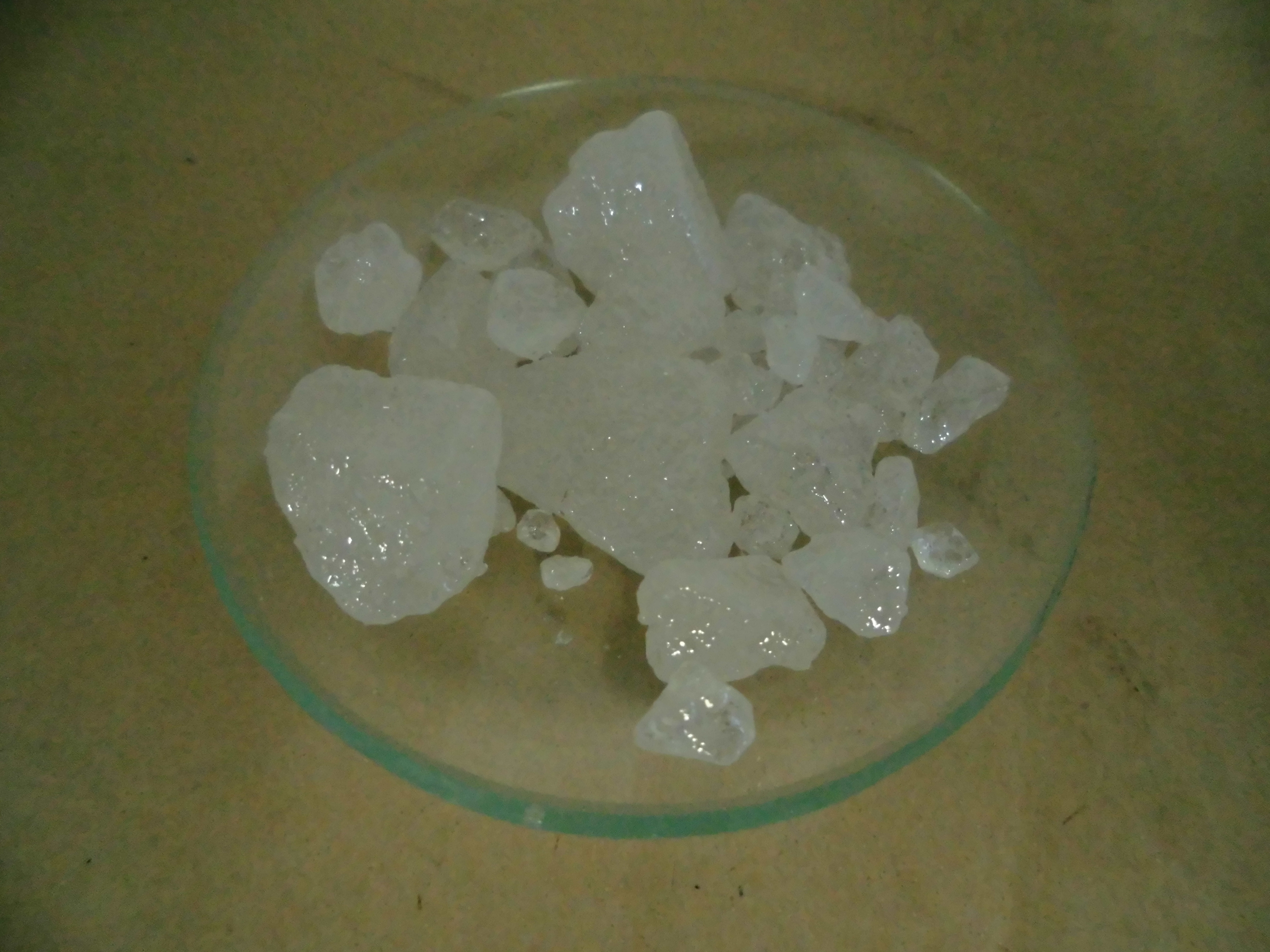 三氯化锑固体。